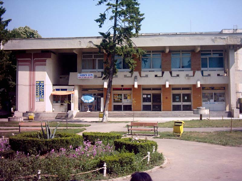 Casa de Cultura a Tineretului Botosani